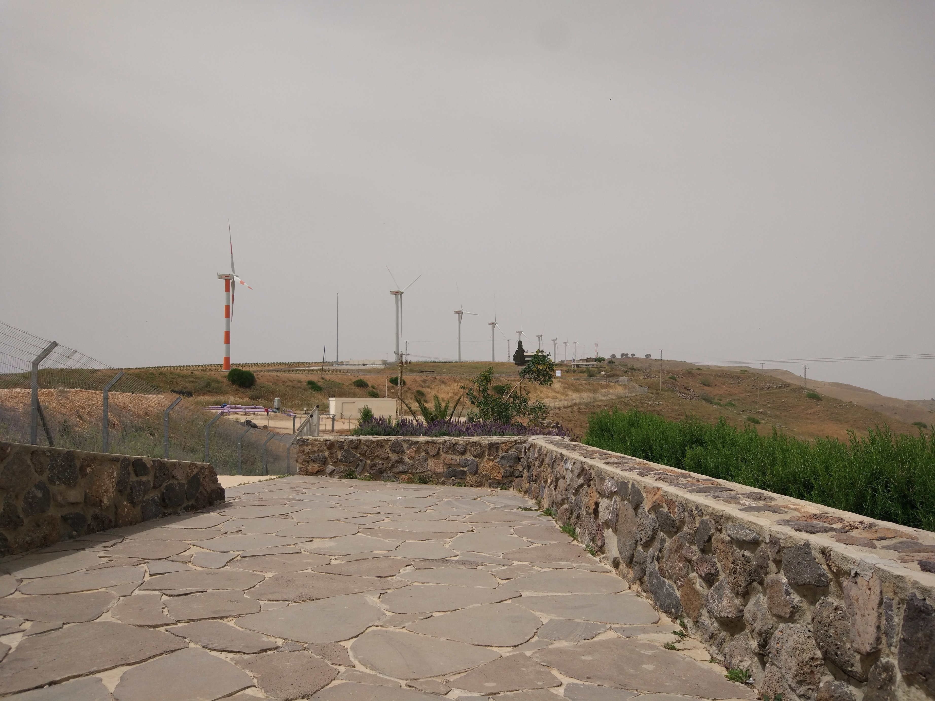 טורבינות רוח ברמת סירין ממצפה נח כנרתי